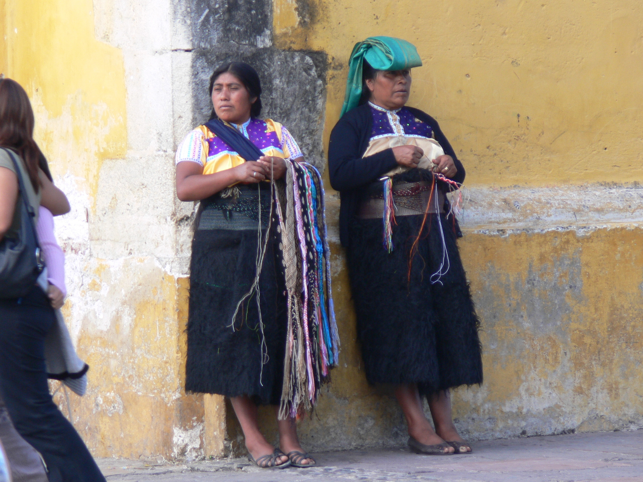 San Cristobal de las Casas. Indian street vendors